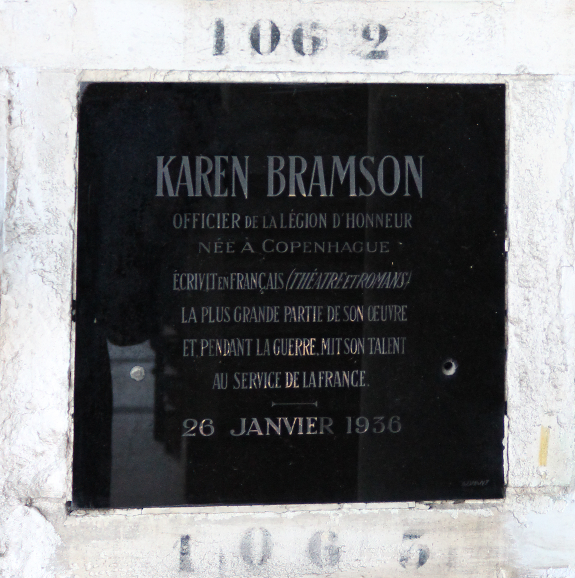 Case n°1062 de Karen Bramson (1875-1936), au columbarium du cimetière du Père-Lachaise.